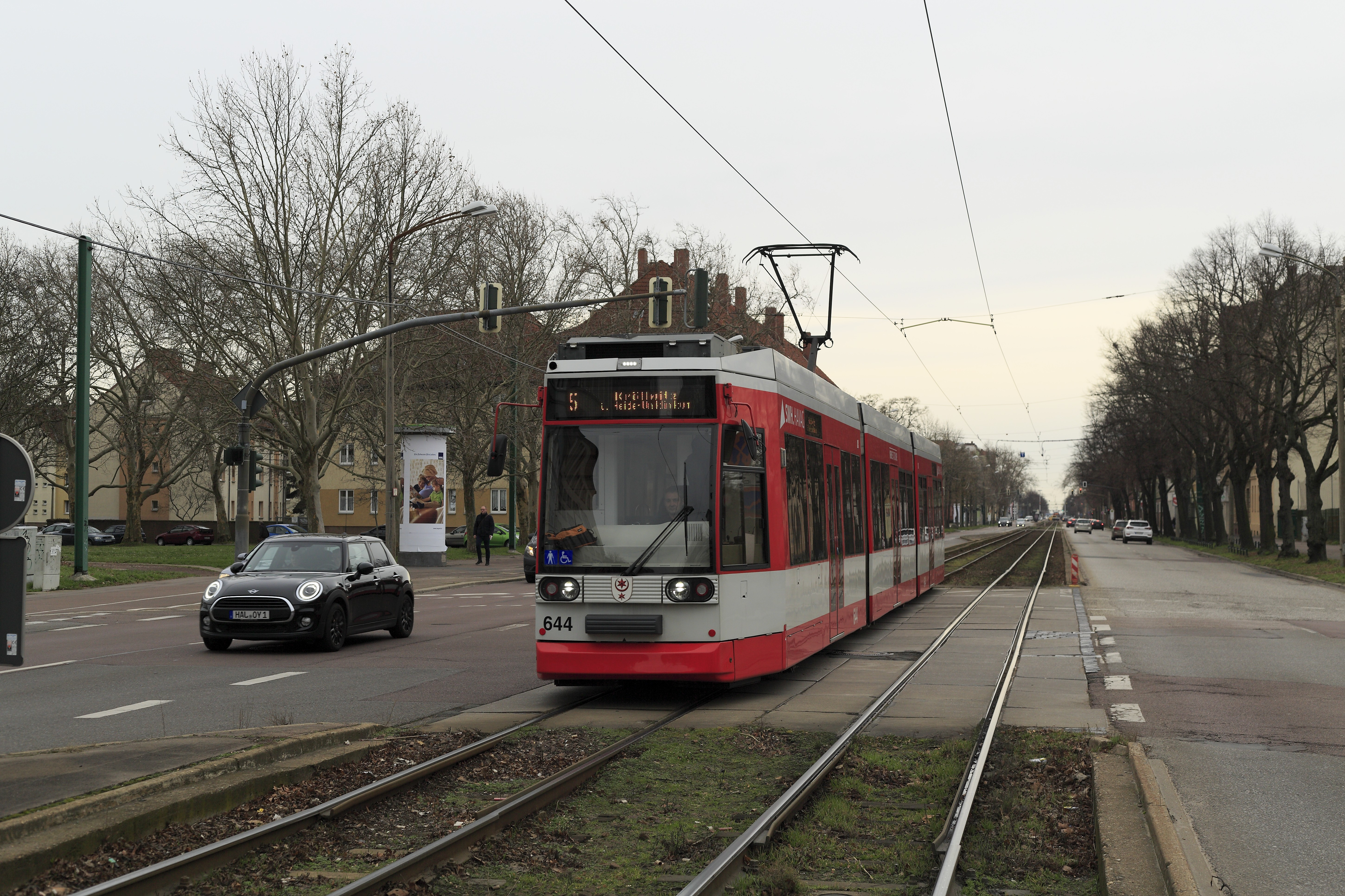 Der Zug der Linie 5 fährt nordwärts nach Kröllwitz. Der Wagen 644 ist angenehm werbefrei.